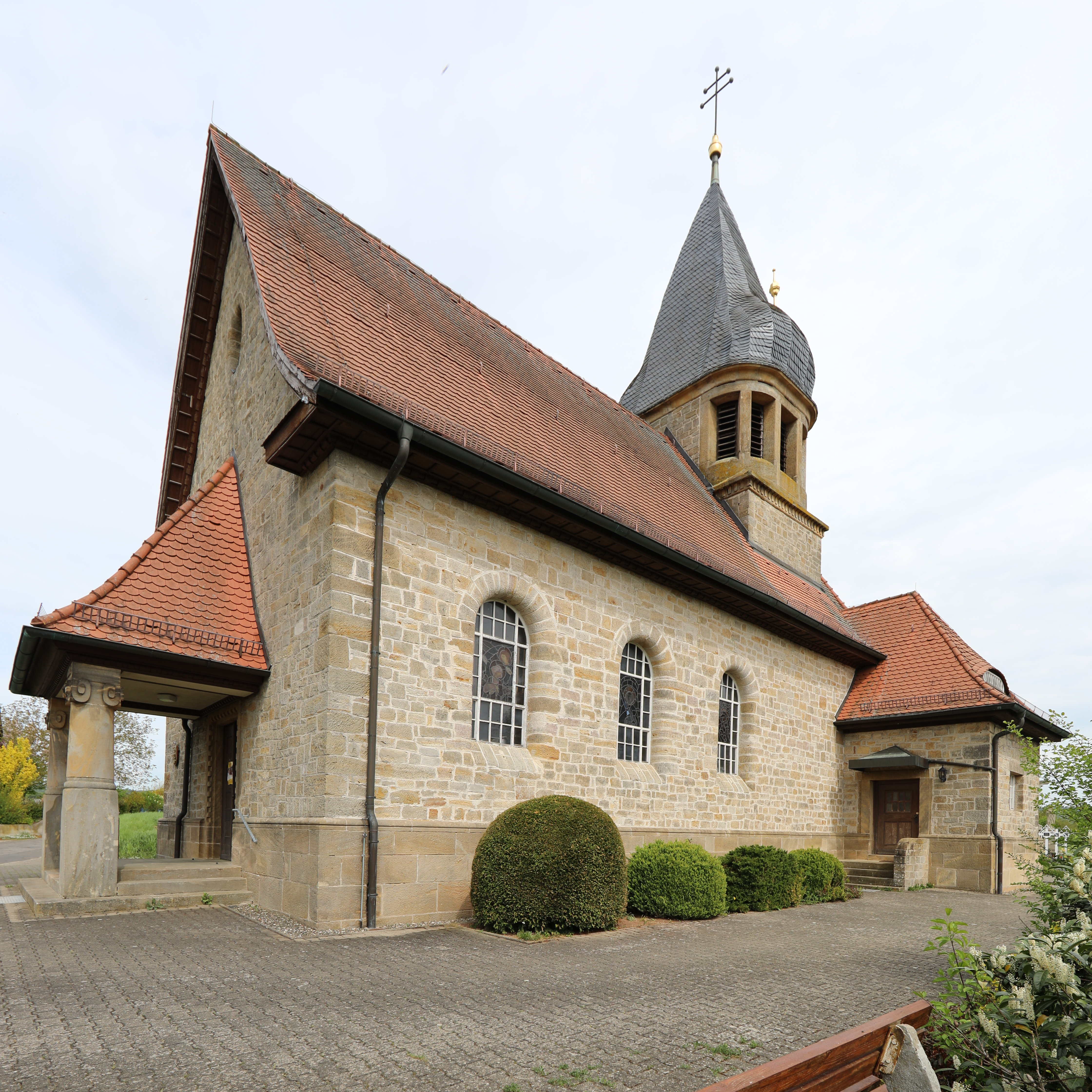 Kraisdorf, katholische Filialkirche Heiligstes Altarsakarment 1912/13